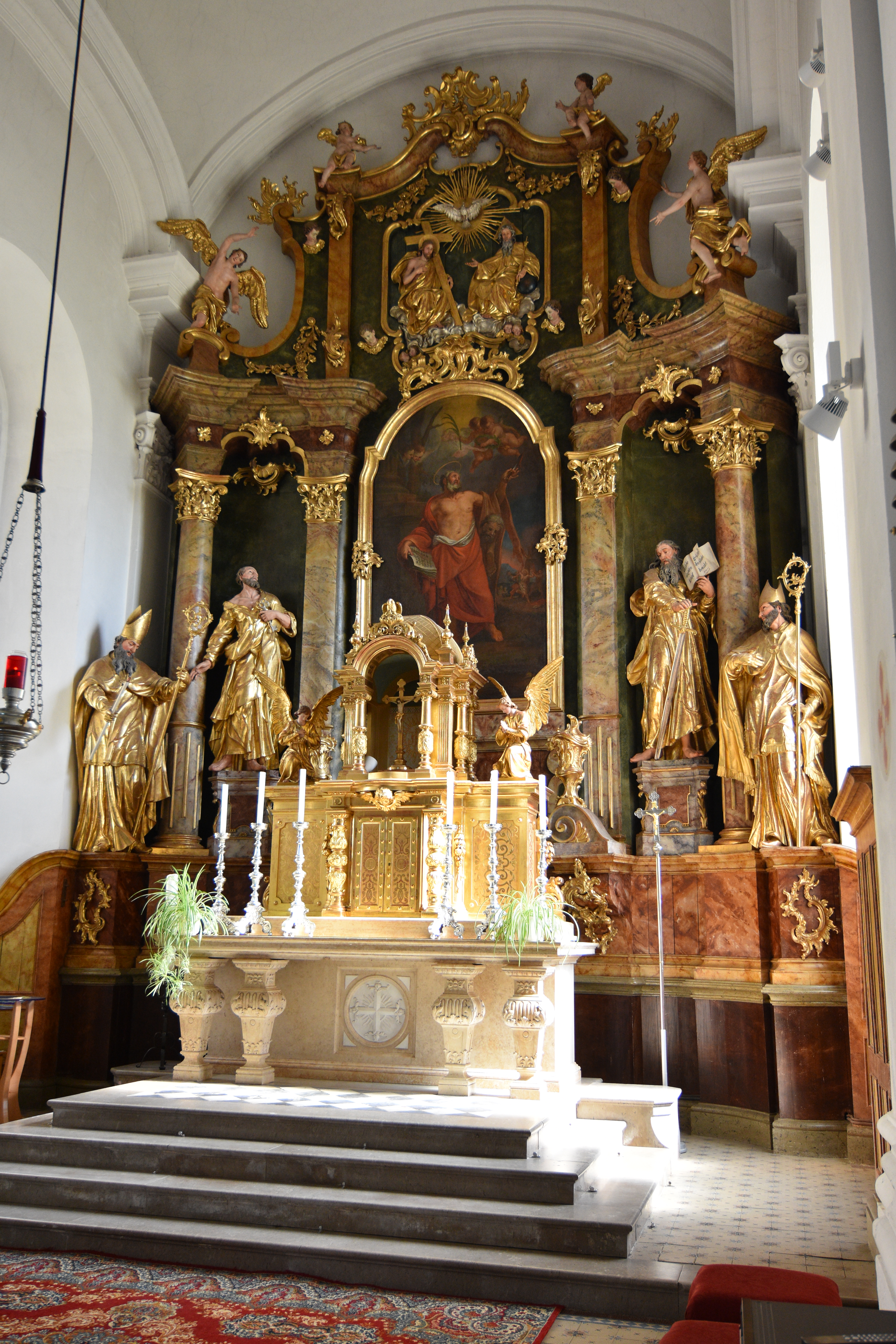 Pfarrkirche hl. Bartholomäus, Mureck Interior